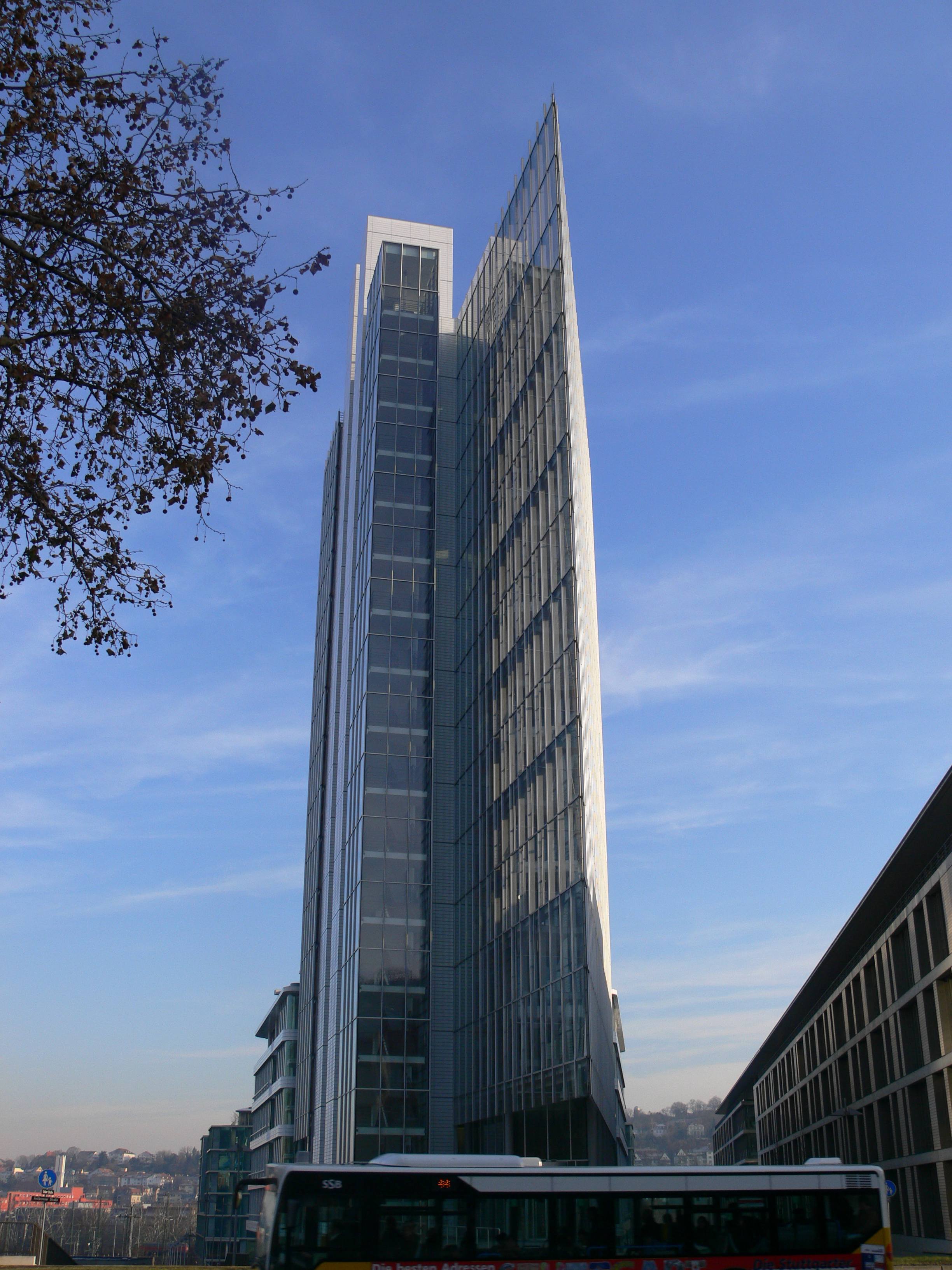 LBBW-Gebäude, Heilbronner Straße (Ecke Osloer Straße), Stuttgart